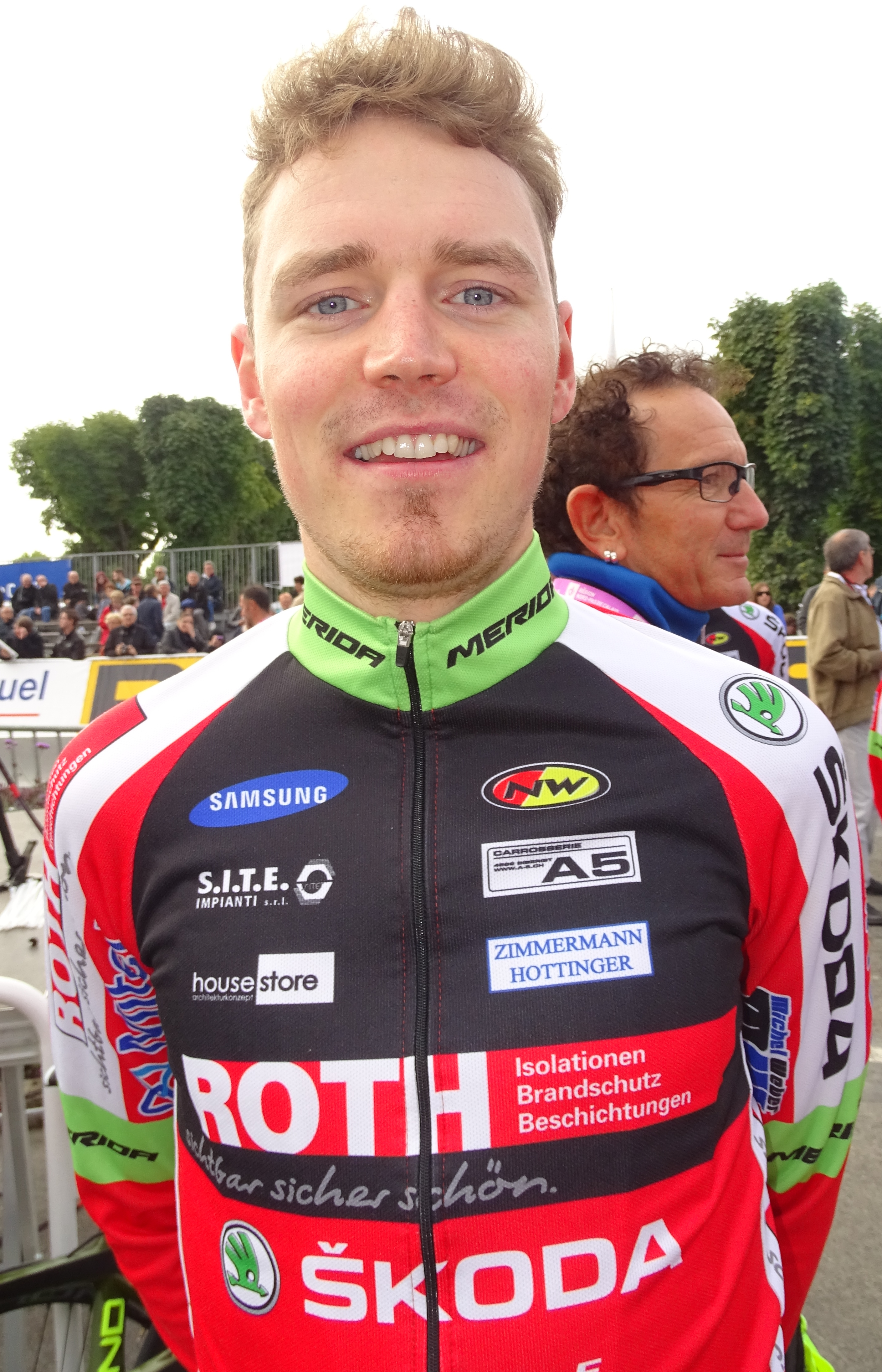 Reportage réalisé le dimanche 6 septembre à l'occasion du départ et de l'arrivée du Grand Prix de Fourmies 2015 à Fourmies, Nord-Pas-de-Calais, France.